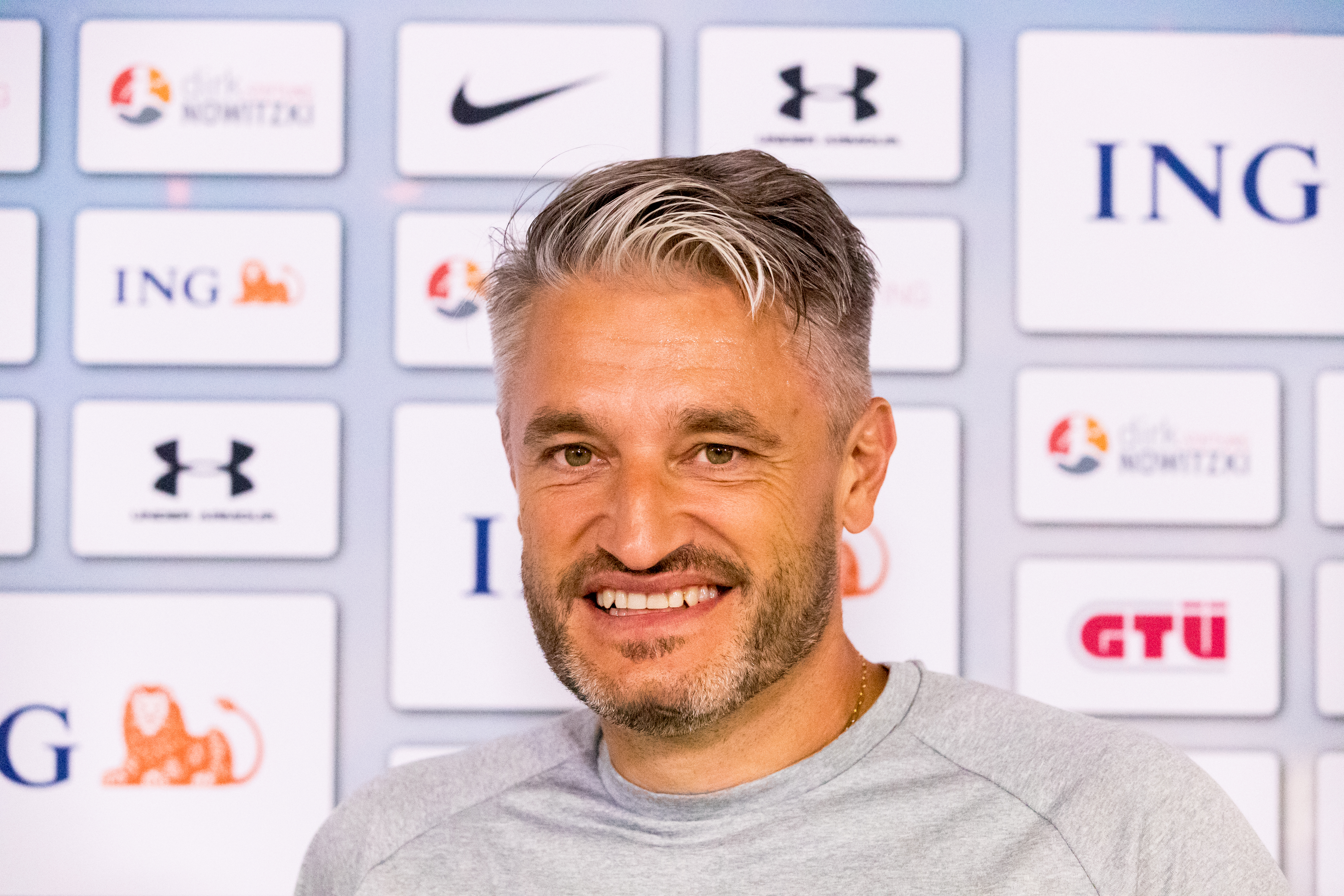 Gerd Schönfelder during Champions for Charity at BayArena, Leverkusen, Nordrhein-Westfalen, Germany on 2019-07-21, Photo: Sven Mandel